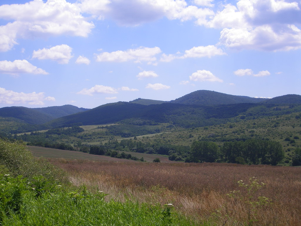 Nagybörzsöny - kilátás a Börzsöny felé a Ganádi-szőlőhegyről